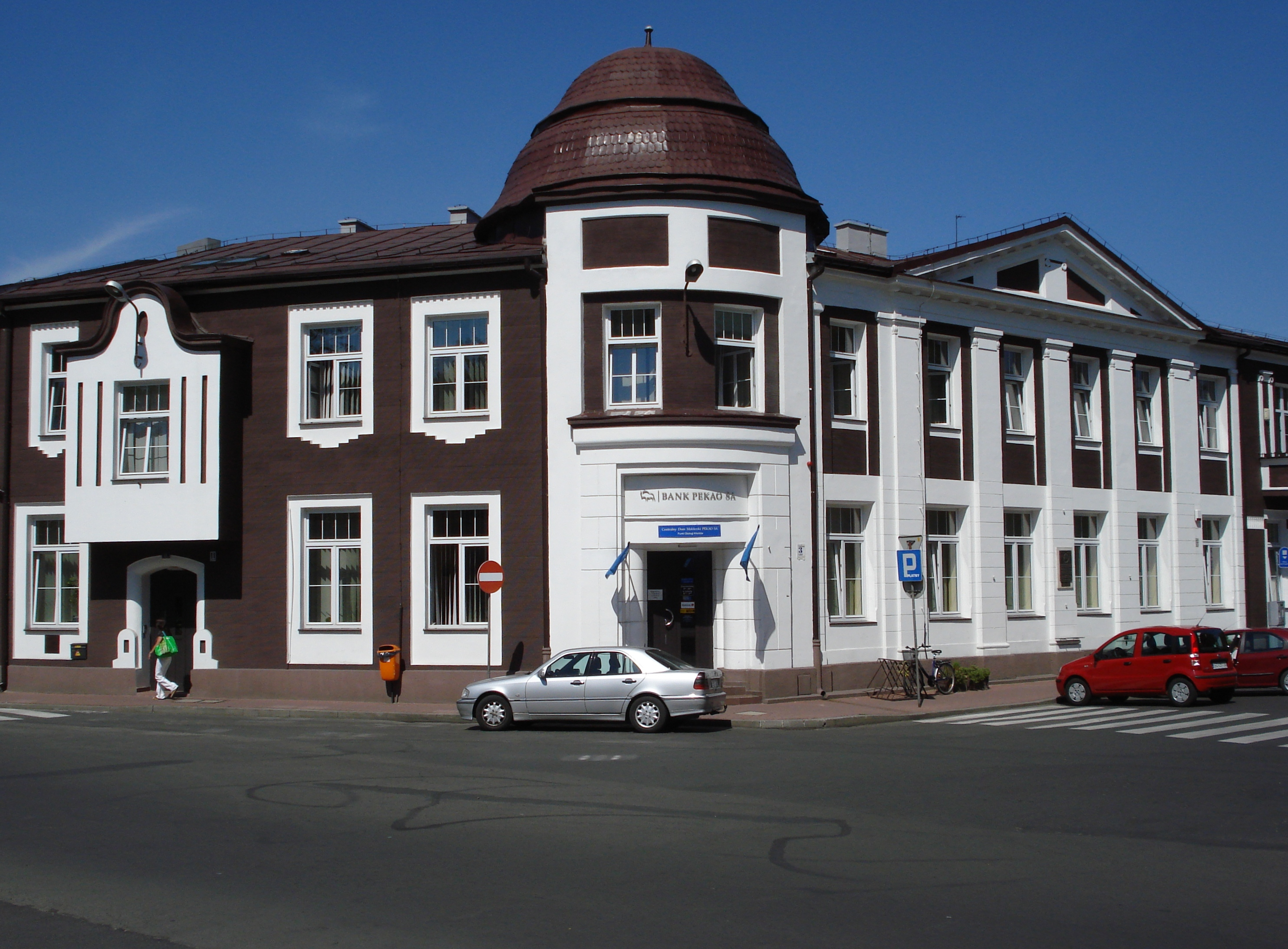 Pl. Kazimierza Wielkiego